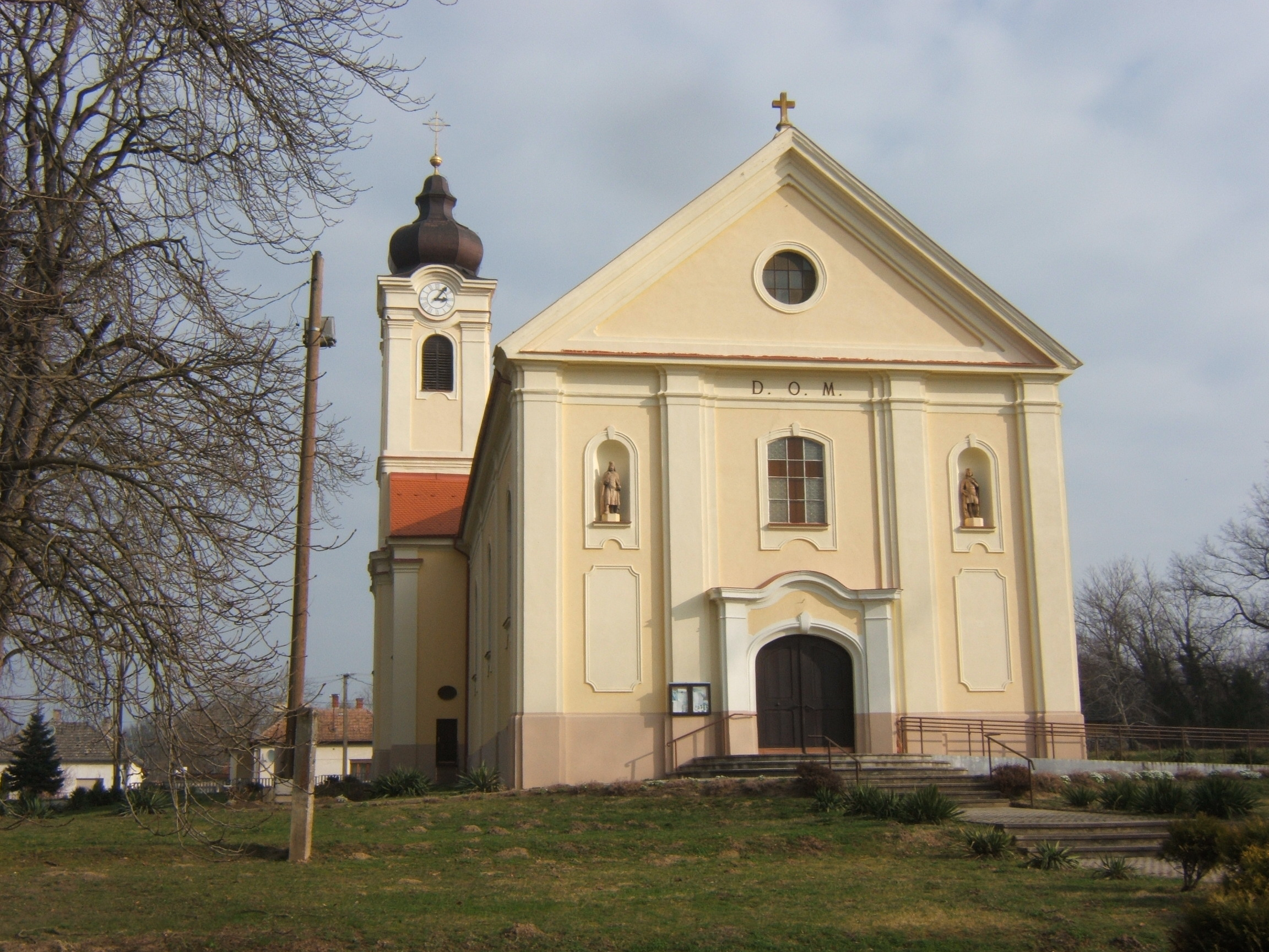 Babócsa, templom